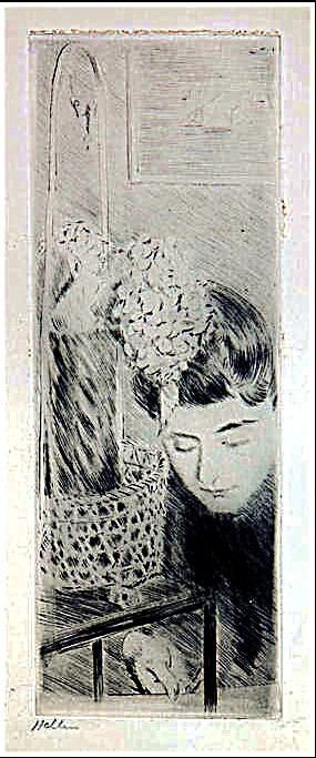 Femme avec hortensias. La gravure (qui date probablement des années 1897-1898) est rare (ill. ci-contre). Elle représente une femme penchée sur sa lecture, sans doute l’épouse et modèle favori de l’artiste, Alice. Sa chevelure est en partie masquée par une volumineuse tête d’hortensia placée dans une corbeille en osier. Cette fleur tant aimée du comte Robert de Montesquiou-Fézensac, a été mise à l’honneur à plusieurs reprises par Helleu, notamment dans un grand pastel conservé au musée Bonnat-Helleu (inv. 2010.1.158) sur lequel on reconnaît la corbeille. À l’arrière-plan, on distingue une marine accrochée au mur. Elle souligne le goût d’Helleu pour ce sujet, qu’il traite notamment en peinture avec une palette qui rappelle les impressionnistes. Au-delà du motif, cette pointe sèche est particulièrement intéressante par son format vertical, inspiré par le japonisme, très en faveur à la fin du XIXe siècle.